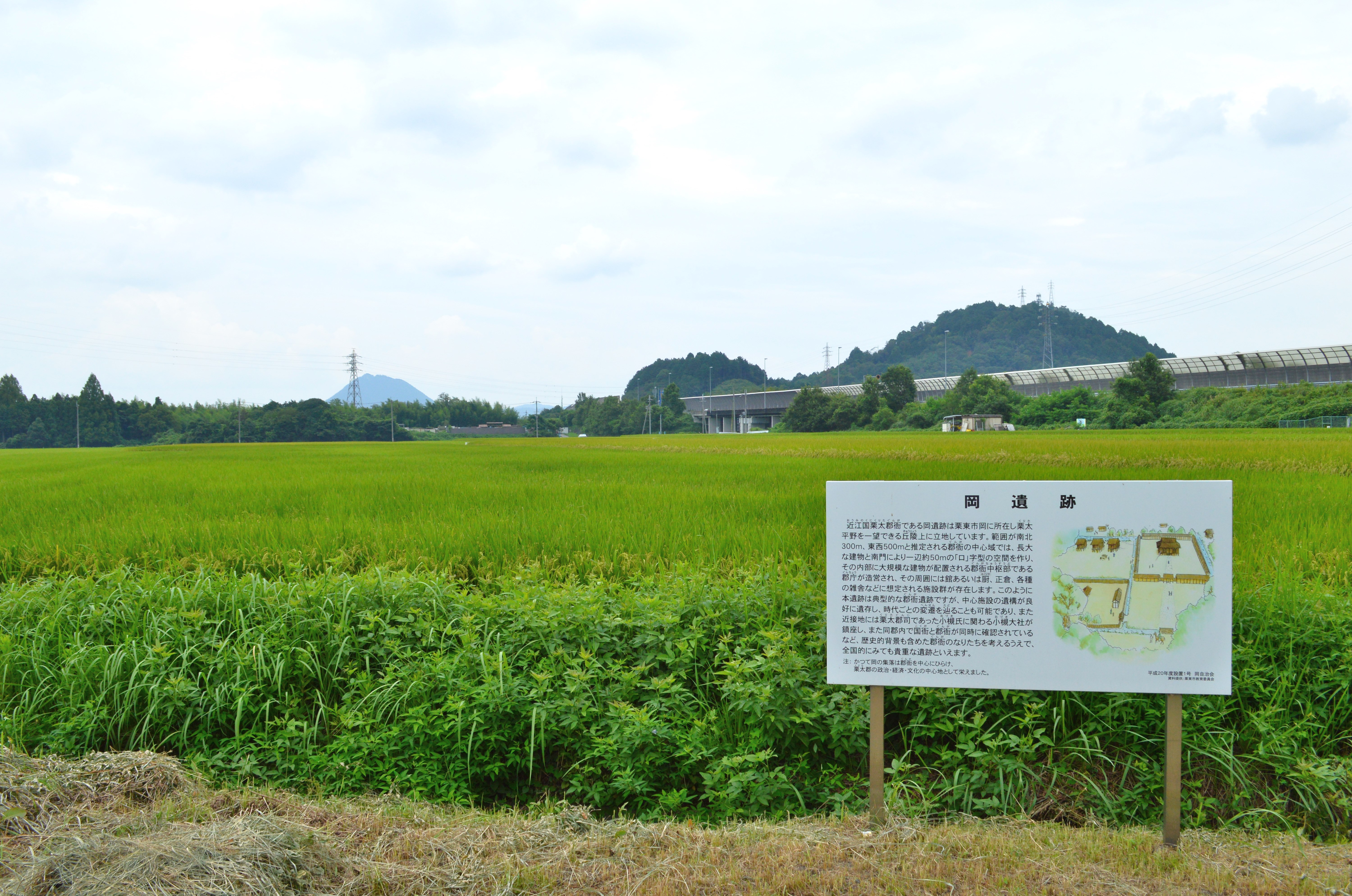 岡遺跡 (栗東市) 全景